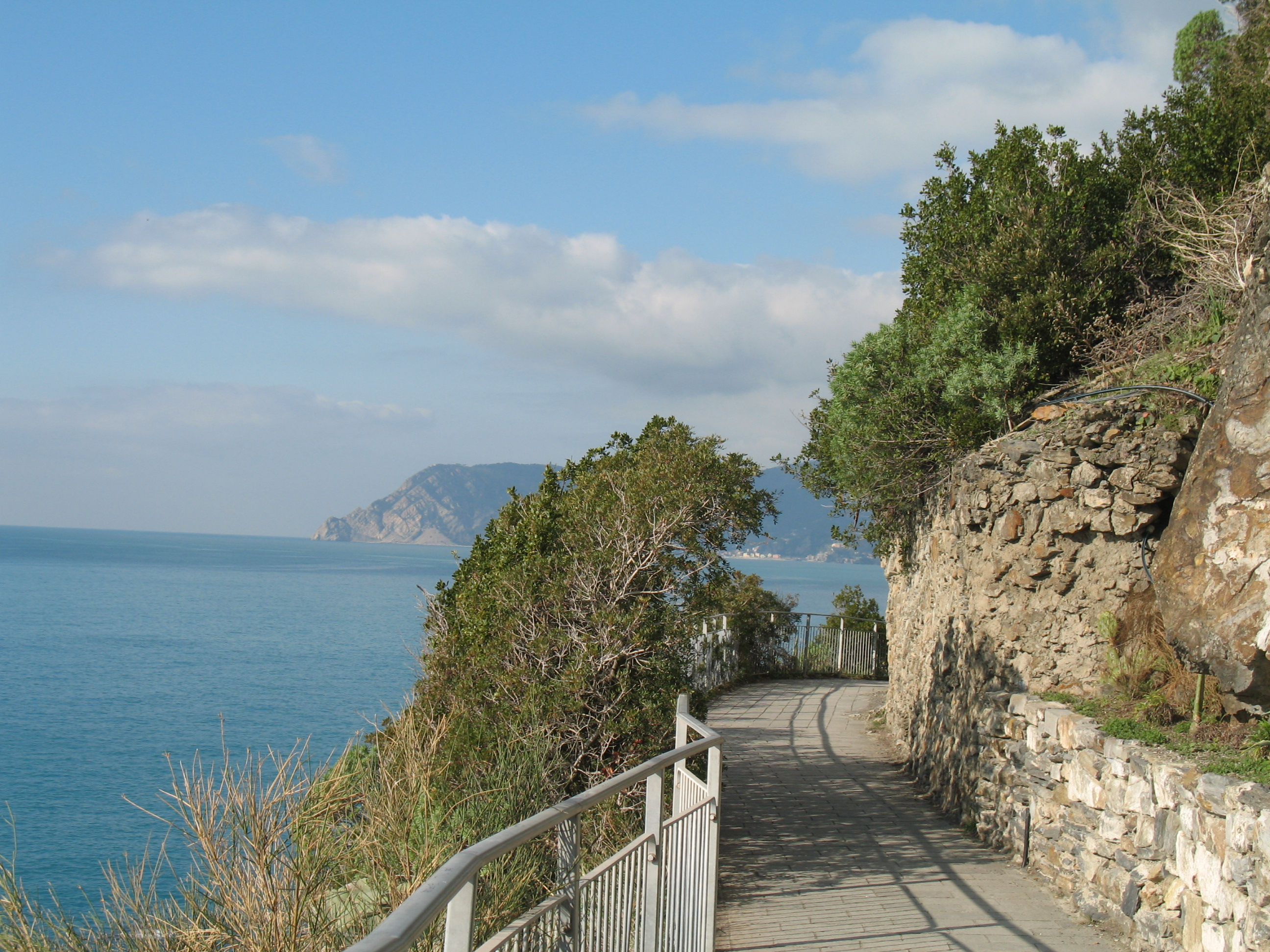 Immagine dalle Cinque Terre Via dell'Amore